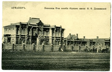 Больница Общества пособия бедным имени Февронии Федоровны Довжиковой в городе Армавире, разурушена во время Второй мировой войны